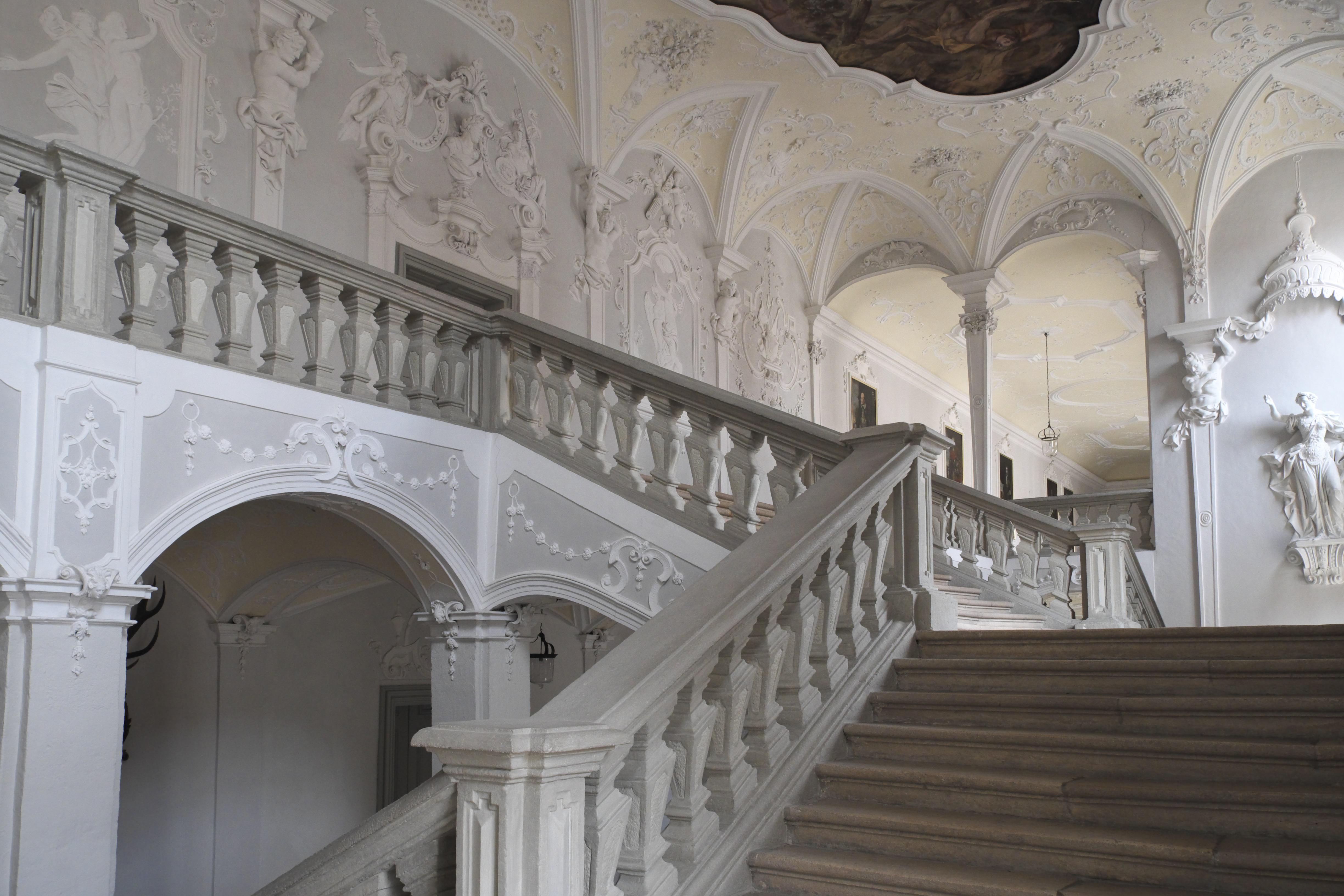 Ehemaliges Deutschordensschloss in Ellingen im Landkreis Weißenburg-Gunzenhausen (Mittelfranken/Bayern), Treppenhaus von Franz Keller, Stuckdekor von Franz Joseph Roth